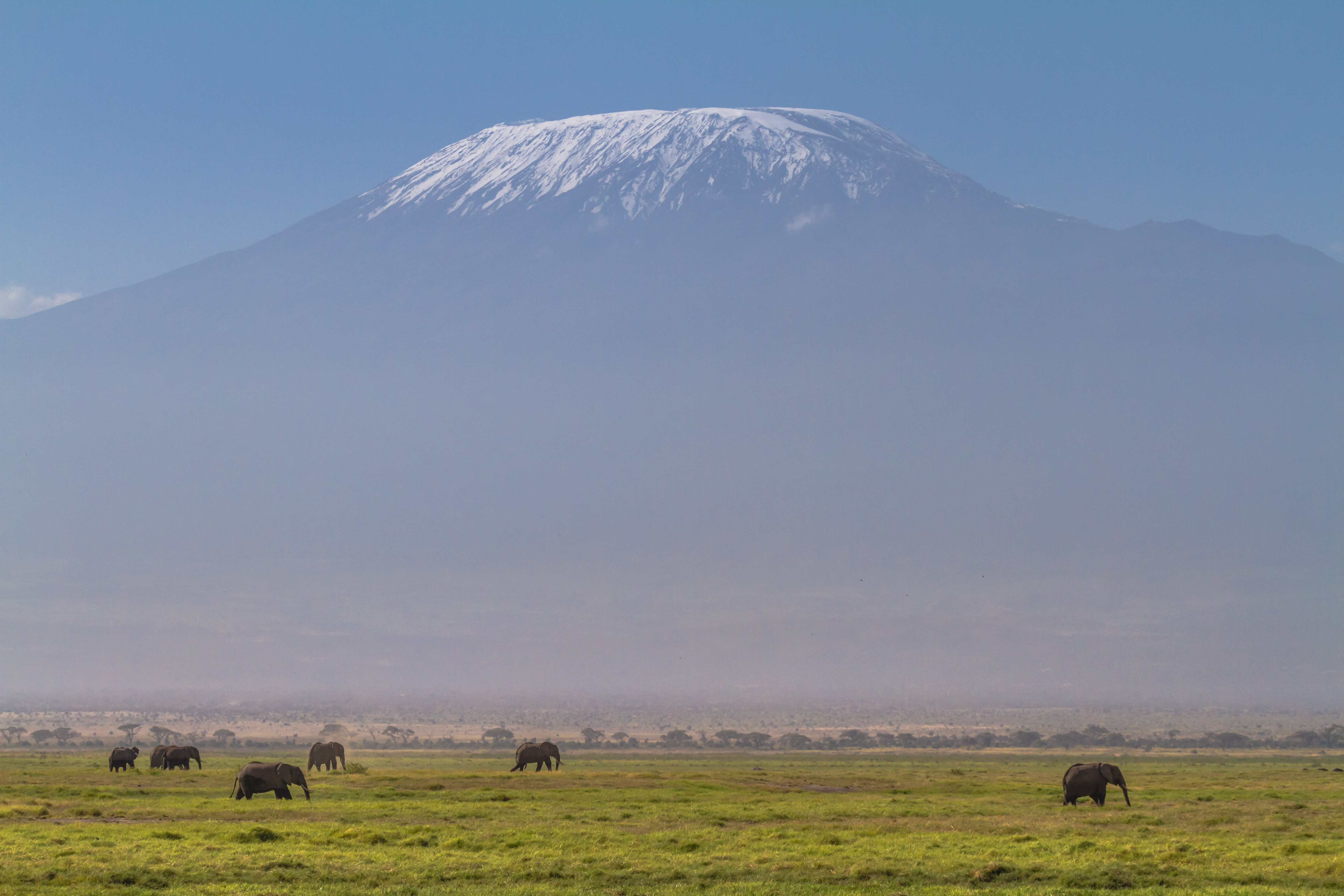 Mount Kilimandjaro in Amboseli national park, south Kenya.